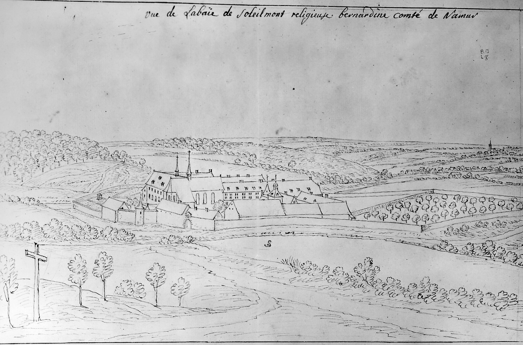 Gilly (Charleroi-Belgique) - Ancienne Abbaye de Soleilmont. Dessin de Remacle Le Loup vers 1738 - 1744.